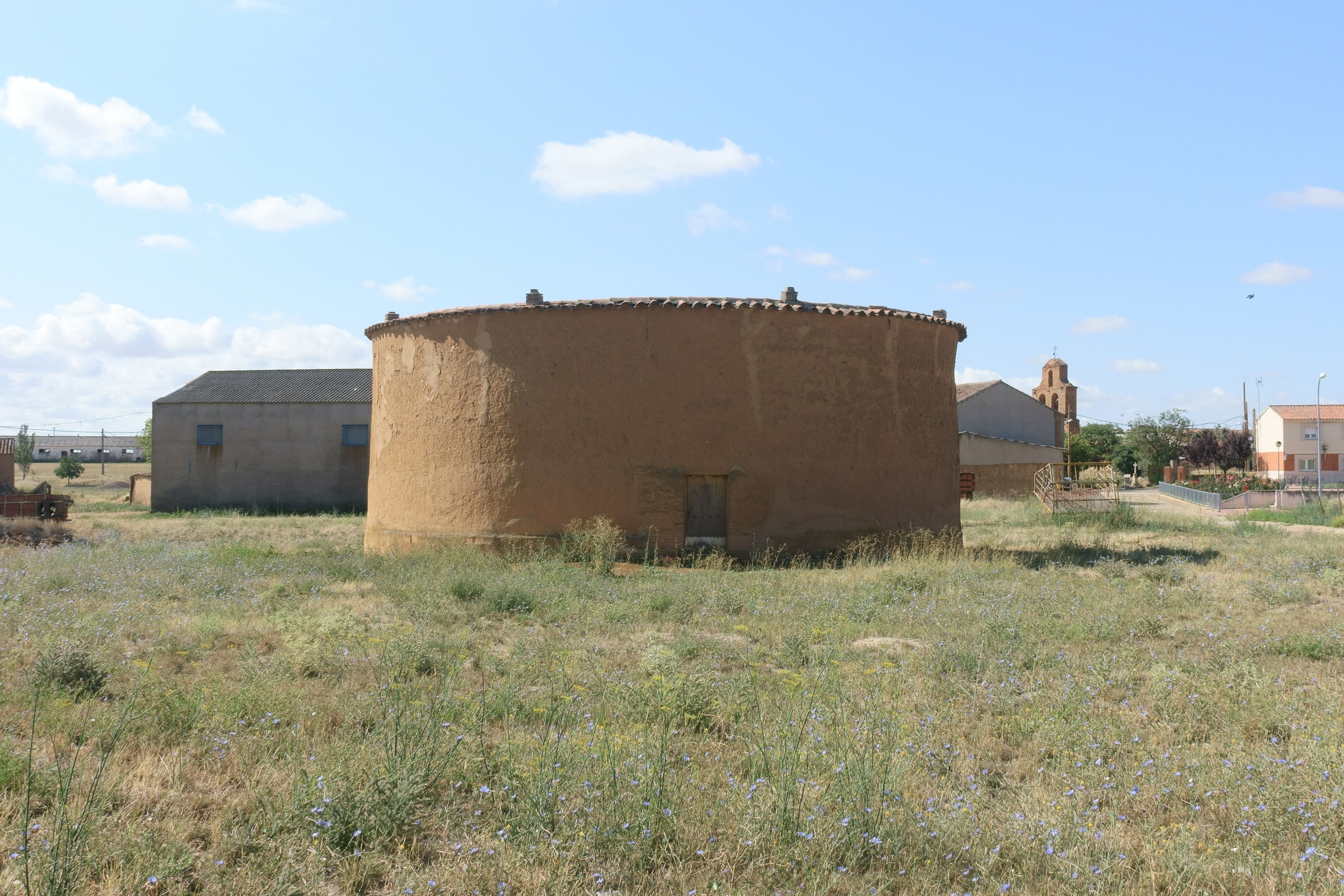 Palomar en La Unión de Campos (Valladolid, España).